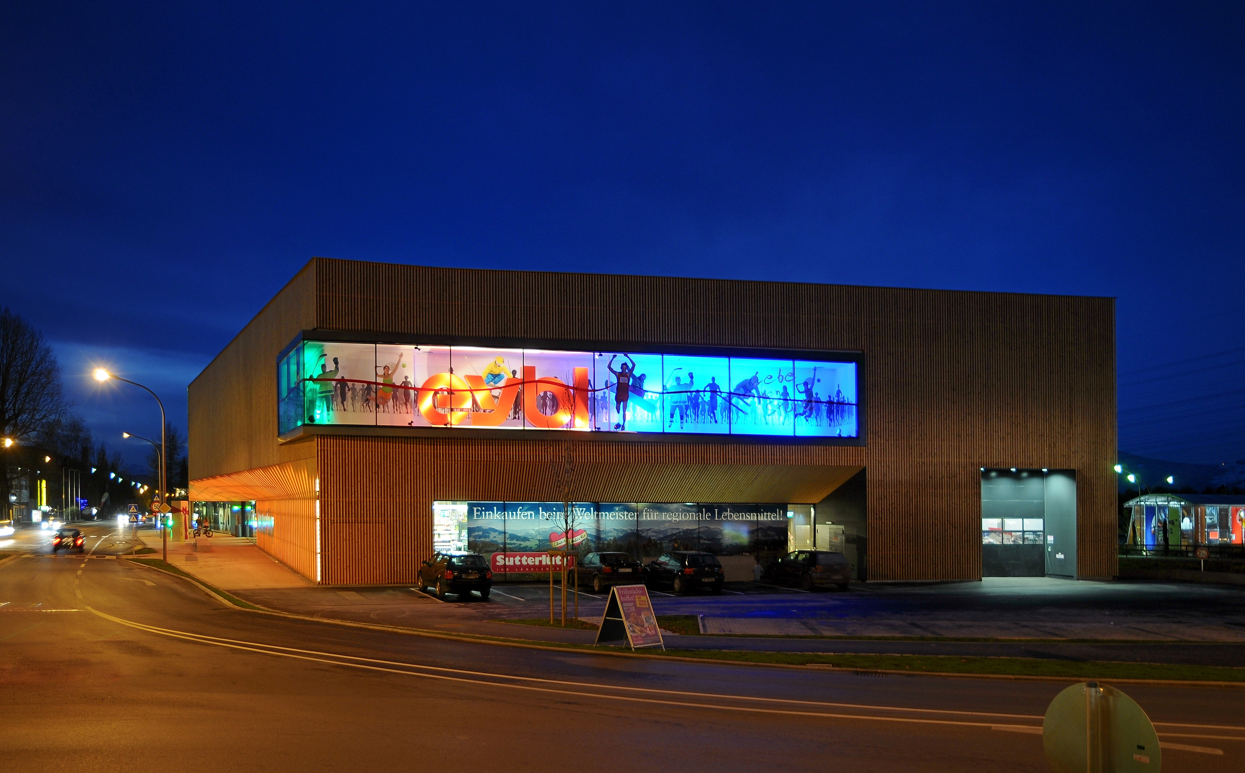 Einkaufszentrum Sutterlüty und eybl in Hohenems. Fertiggestellt im Jahr 2010 nach Plänen des Schwarzacher Architekturbüro DI Hermann Kaufmann ZT GmbH.